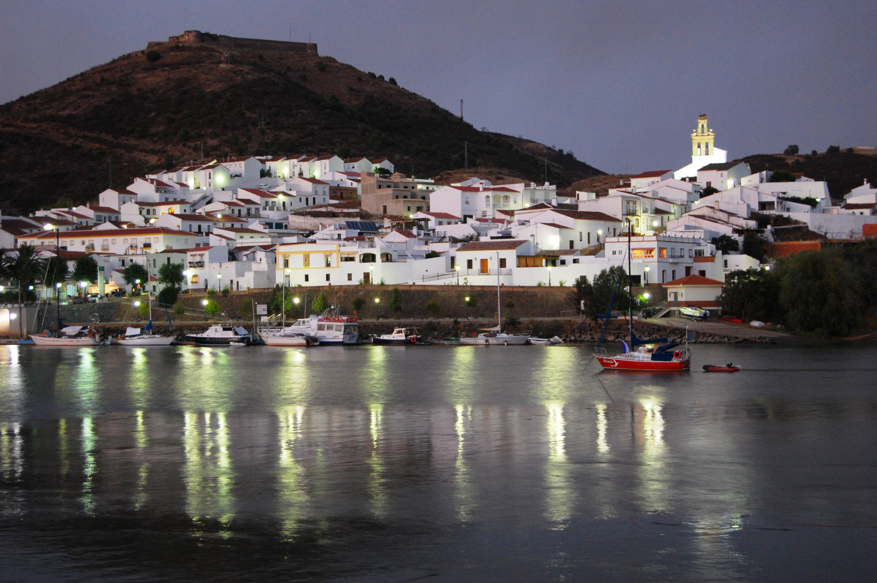 Sanlúcar de Guadiana-Spain